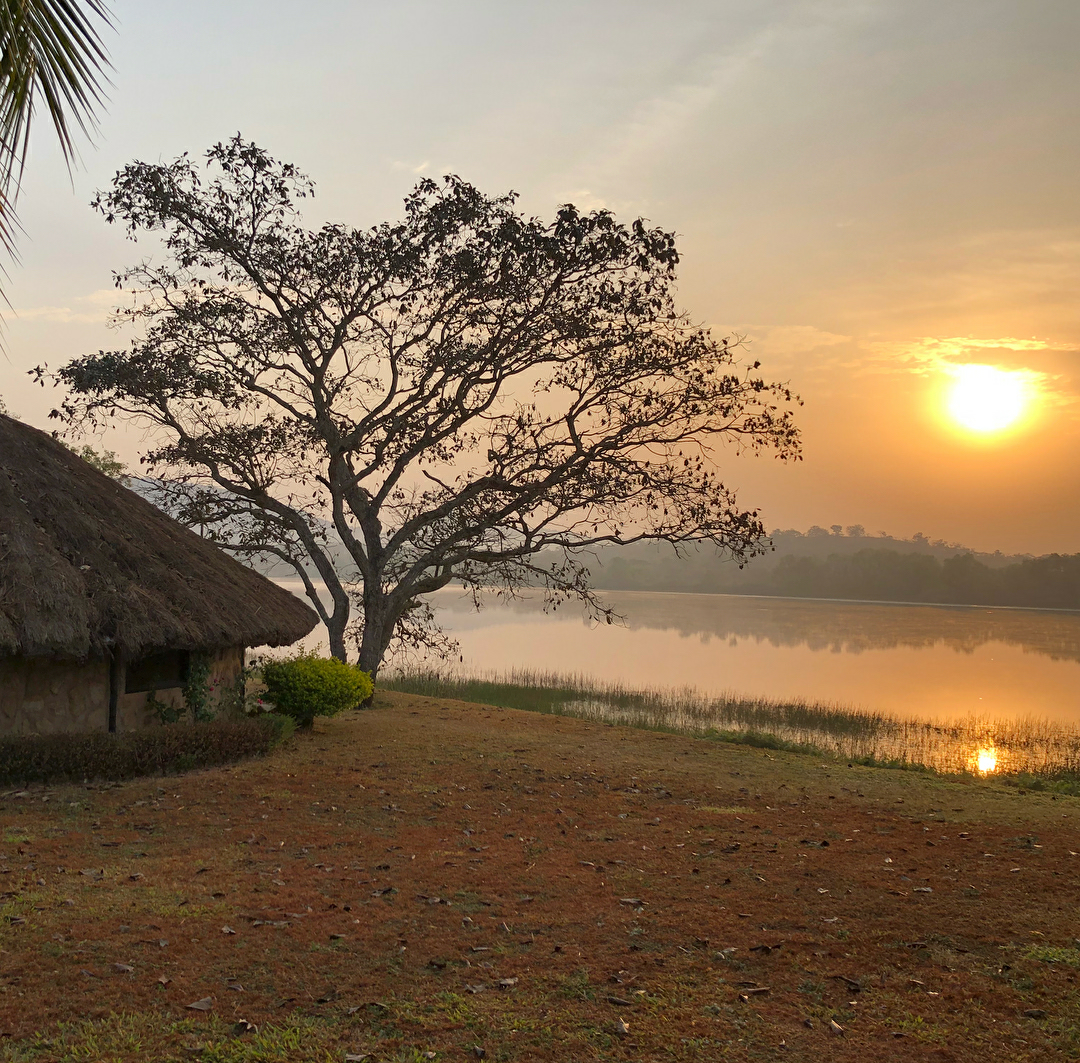 Vue du coucher de soleil depuis les cases de passage, Kouoptamo, Petpenoun, Région de l'Ouest, Cameroun